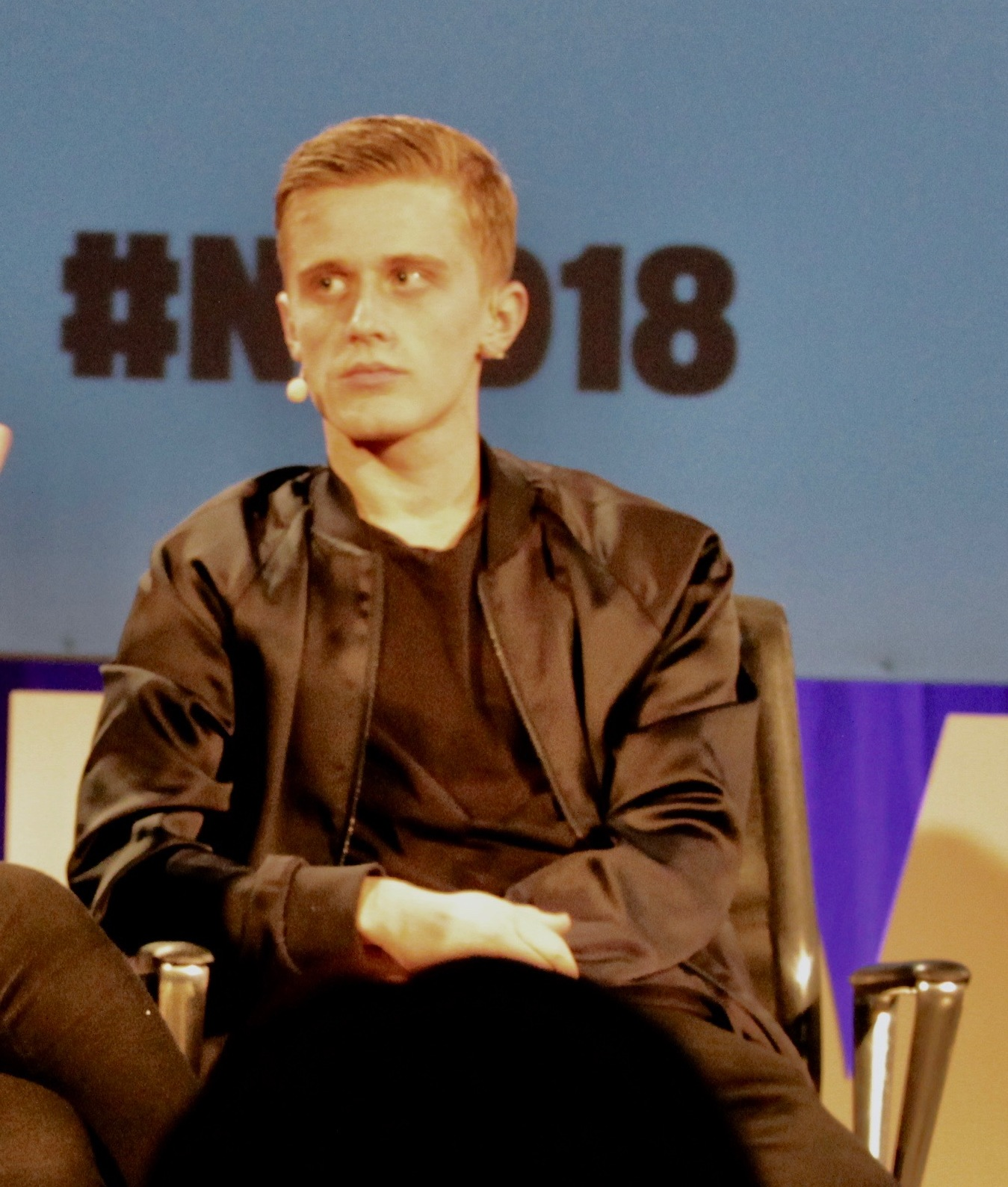 Medvirkende: Johan Fasting, Vilje Kathrine Hagen, Yngvild Sve Flikke, Axel Bøyum.Moderator: Marte Spurkland